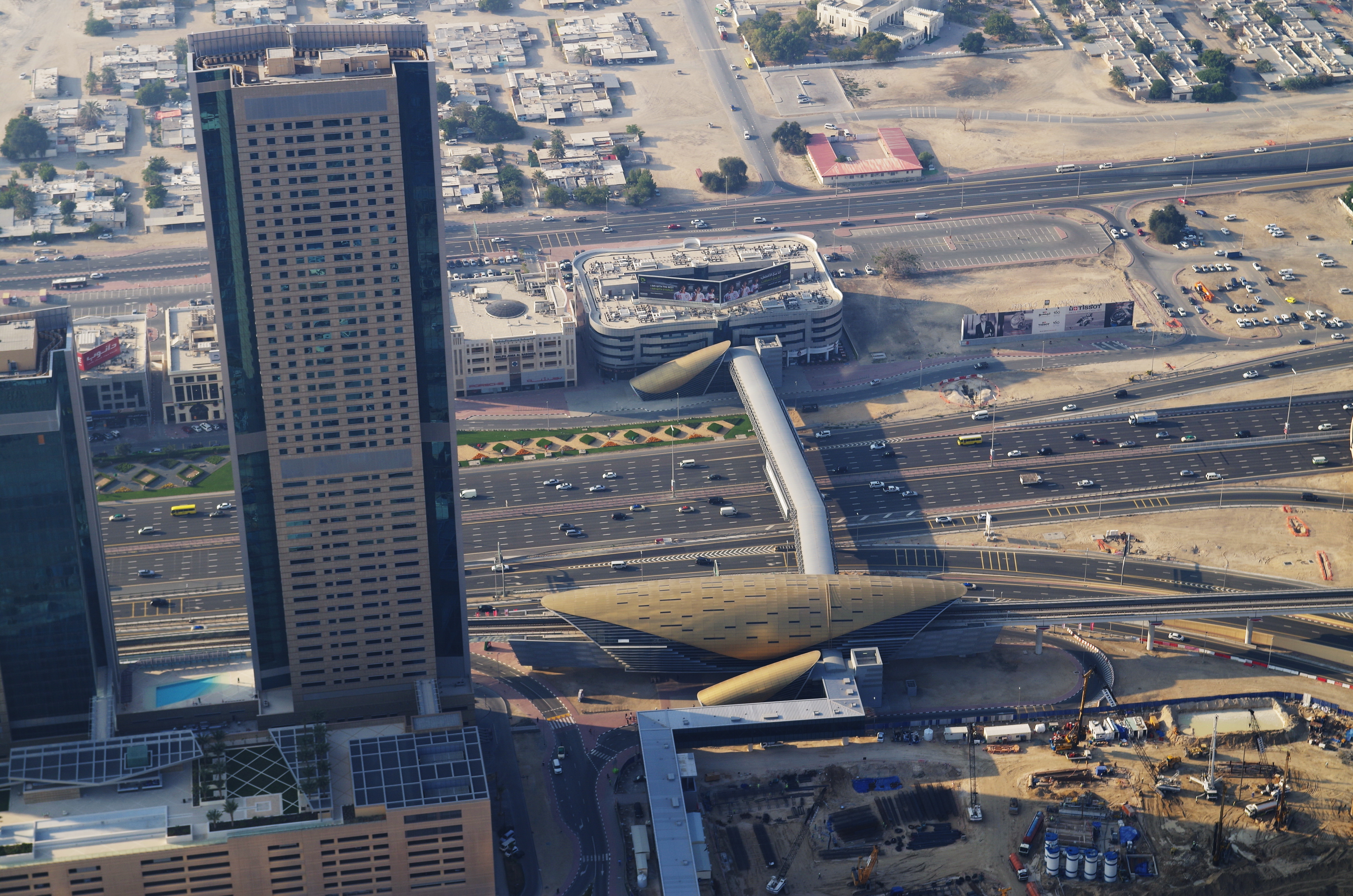 Metro-Station Burj Khalifa/Dubai Mall